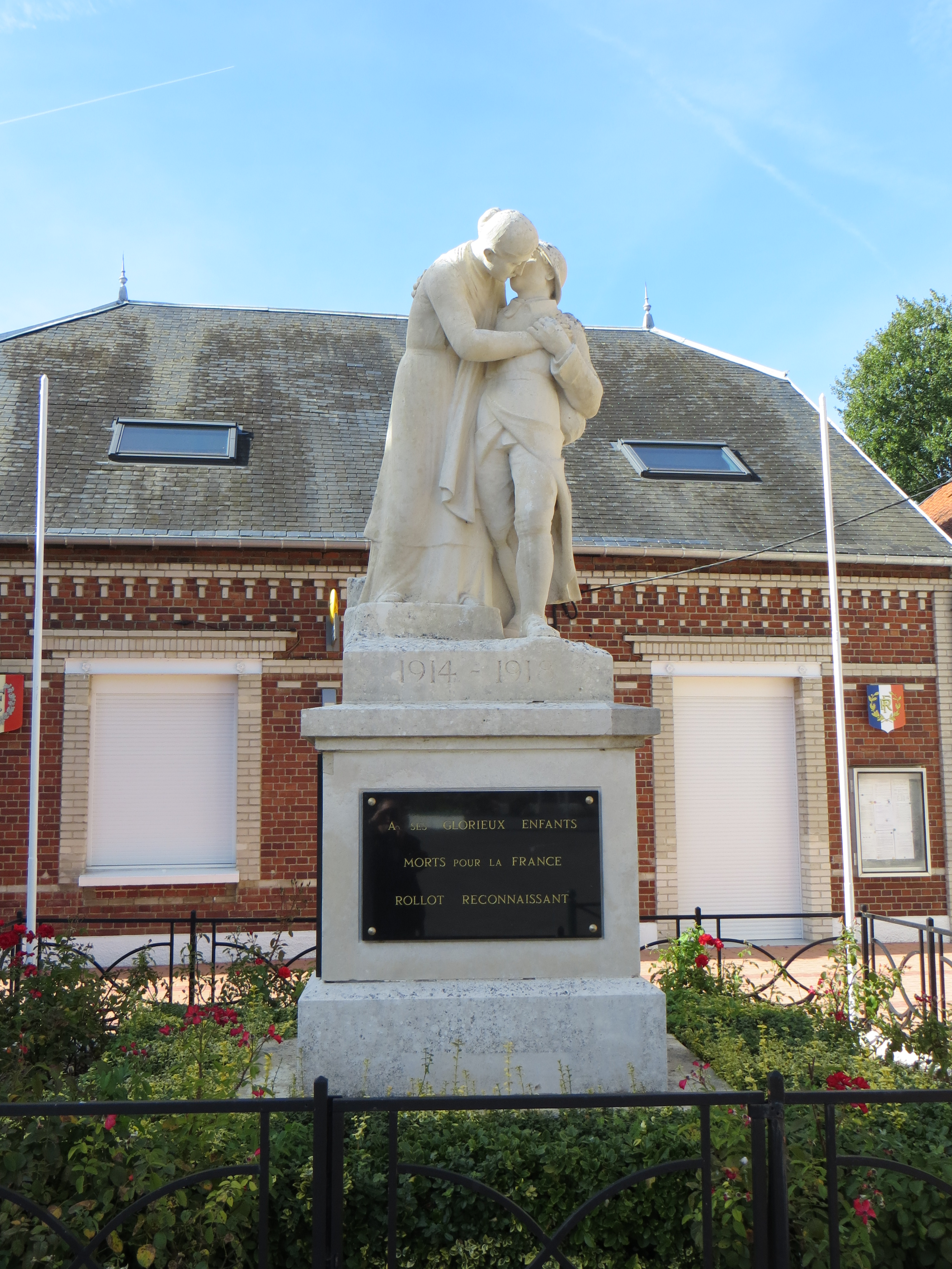 Monument aux morts de la commune, sculpté par Albert Roze